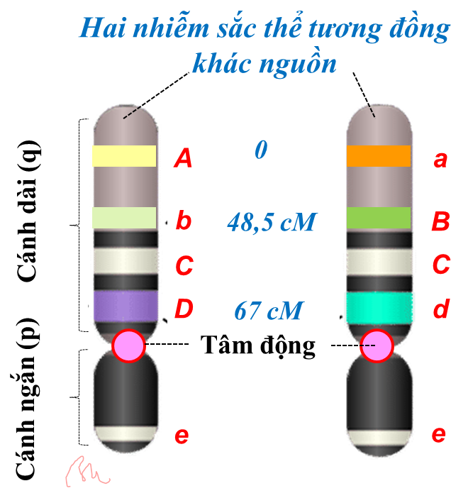 Hai NST tương đồng có 5 lô-cut (A/a – e/e), mỗi lô-cut có hai a-len.